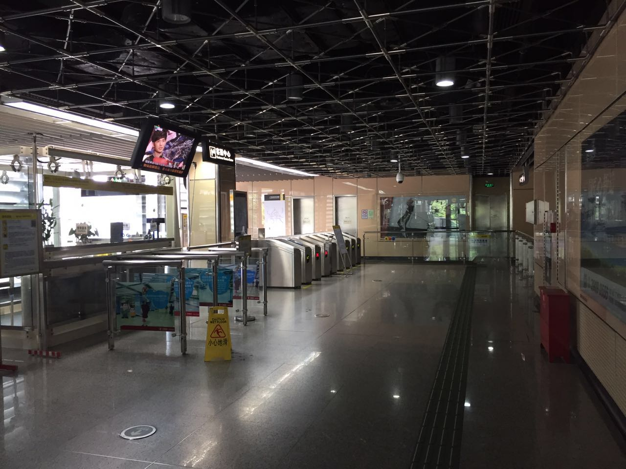 广州地铁黄阁汽车城站